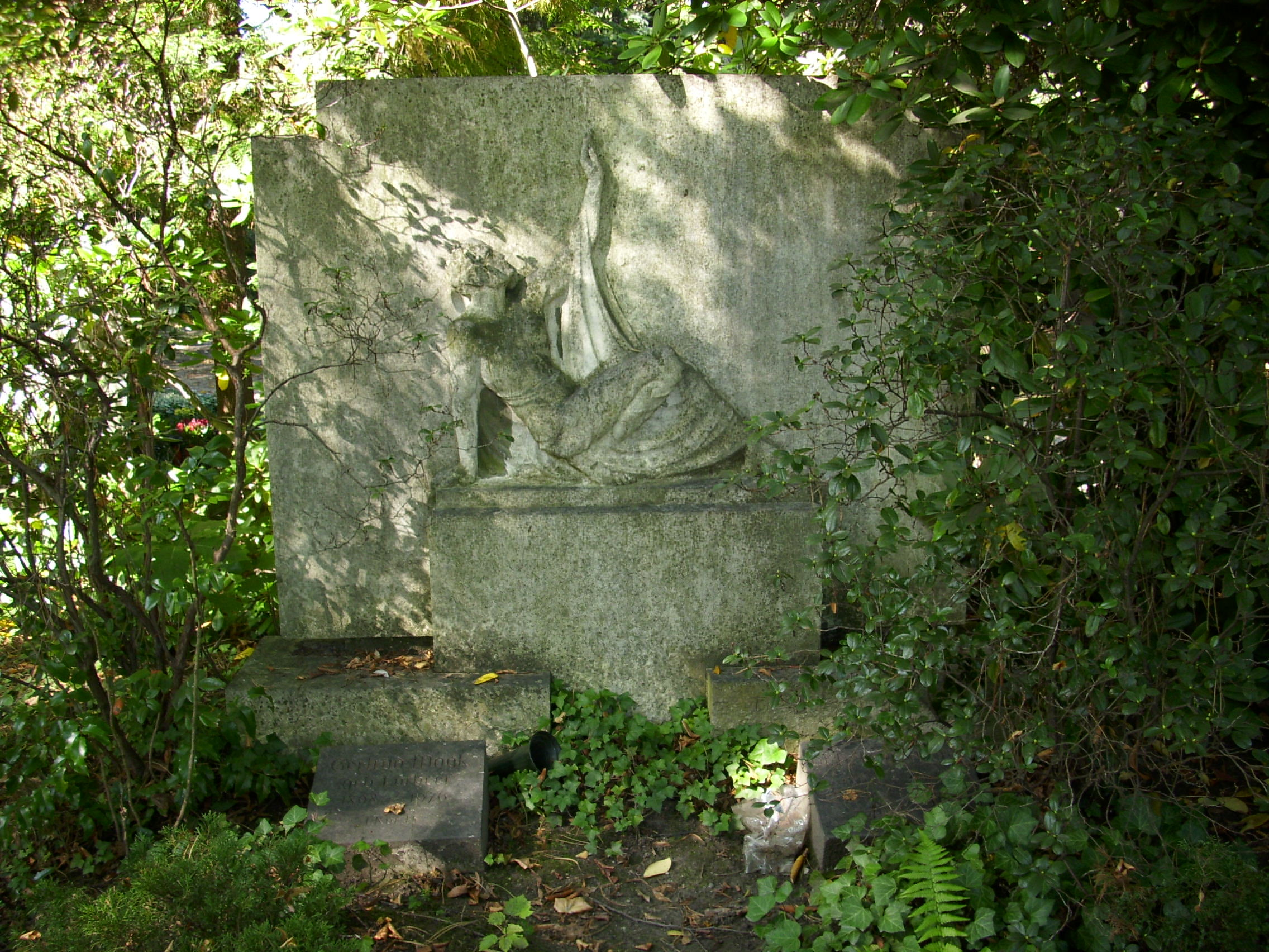 Grabstätte Eduard Mogk auf dem Südfriedhof in Leipzig, Grabstein von Max Alfred Brumme (1891–1967)